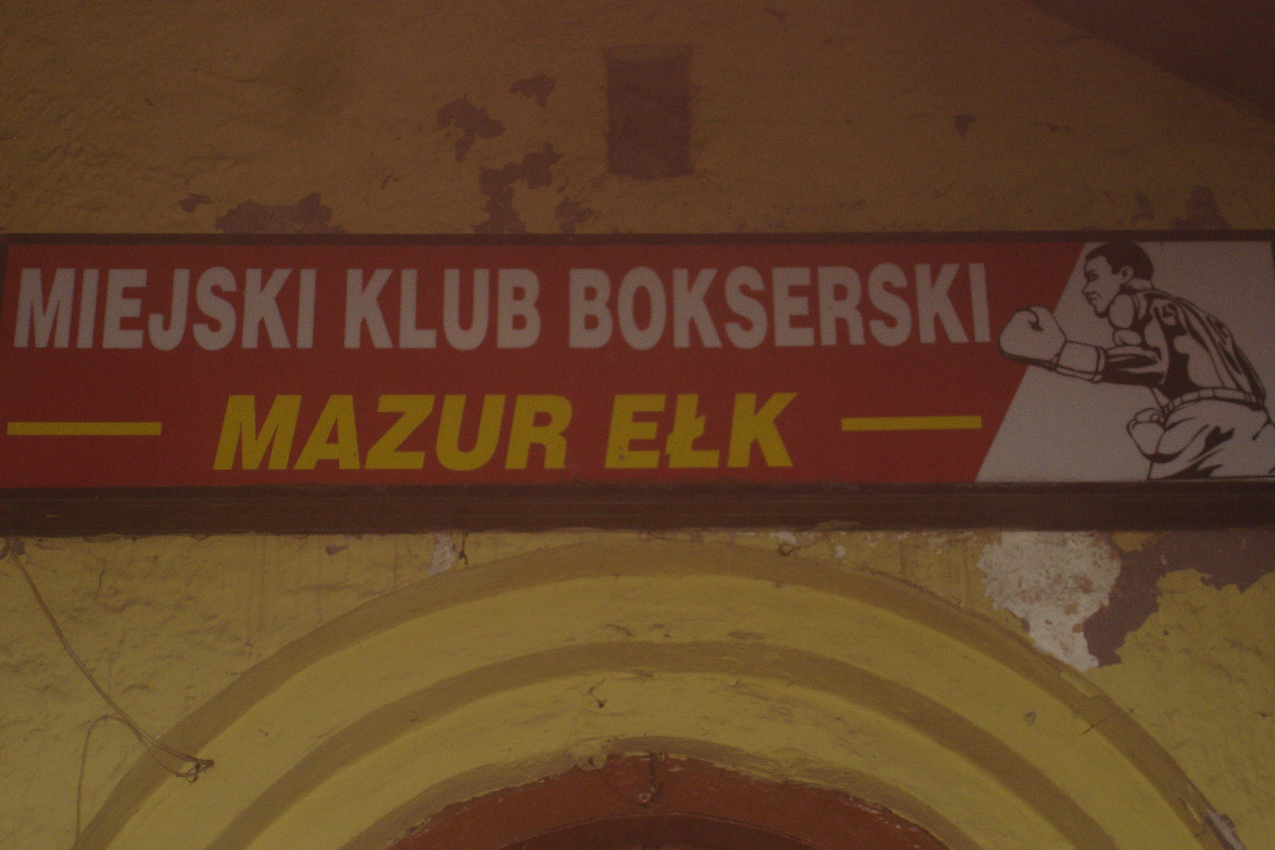 MKB Mazur Ełk